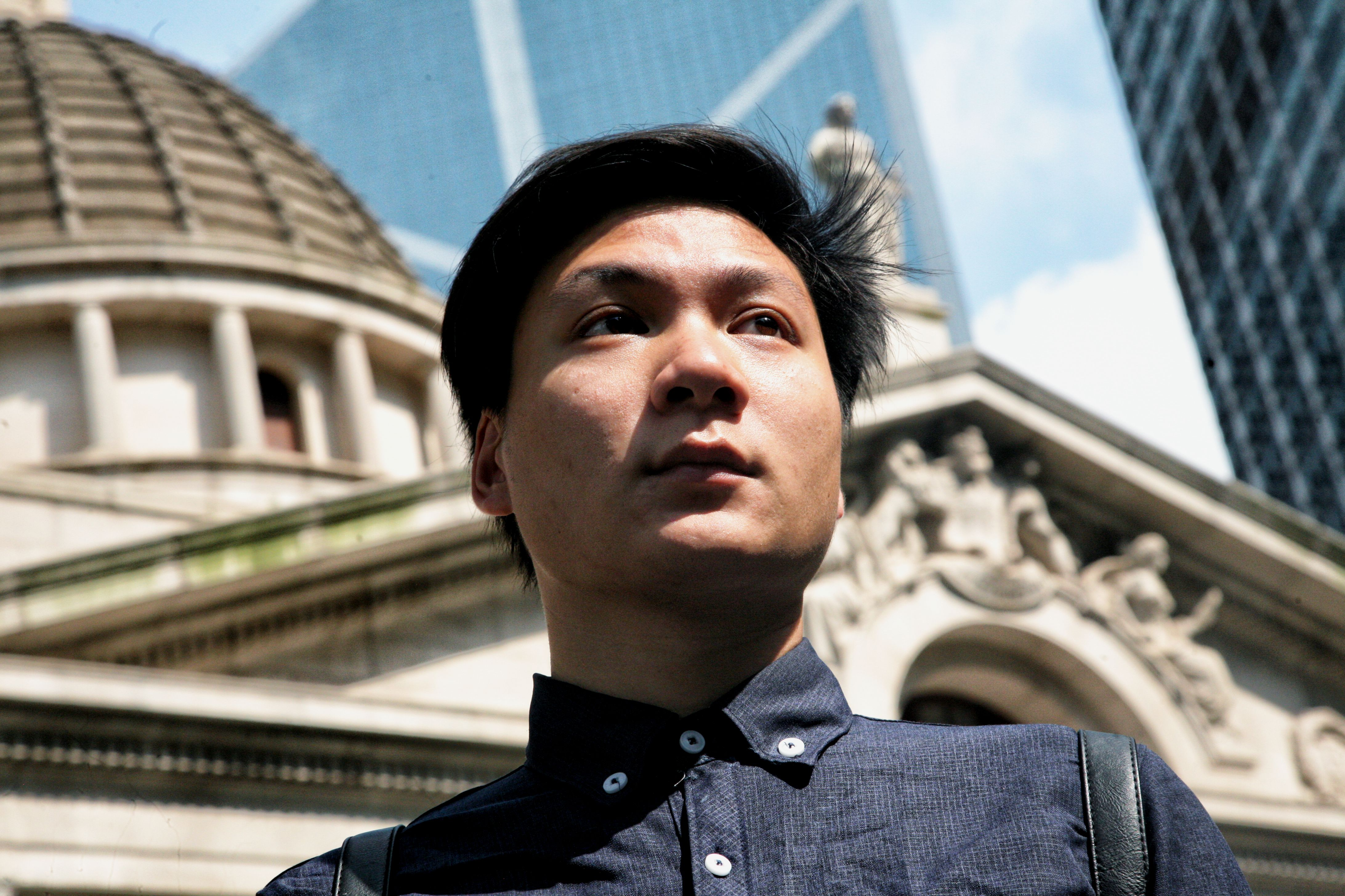 粵語: 陳家駒喺終審法院前